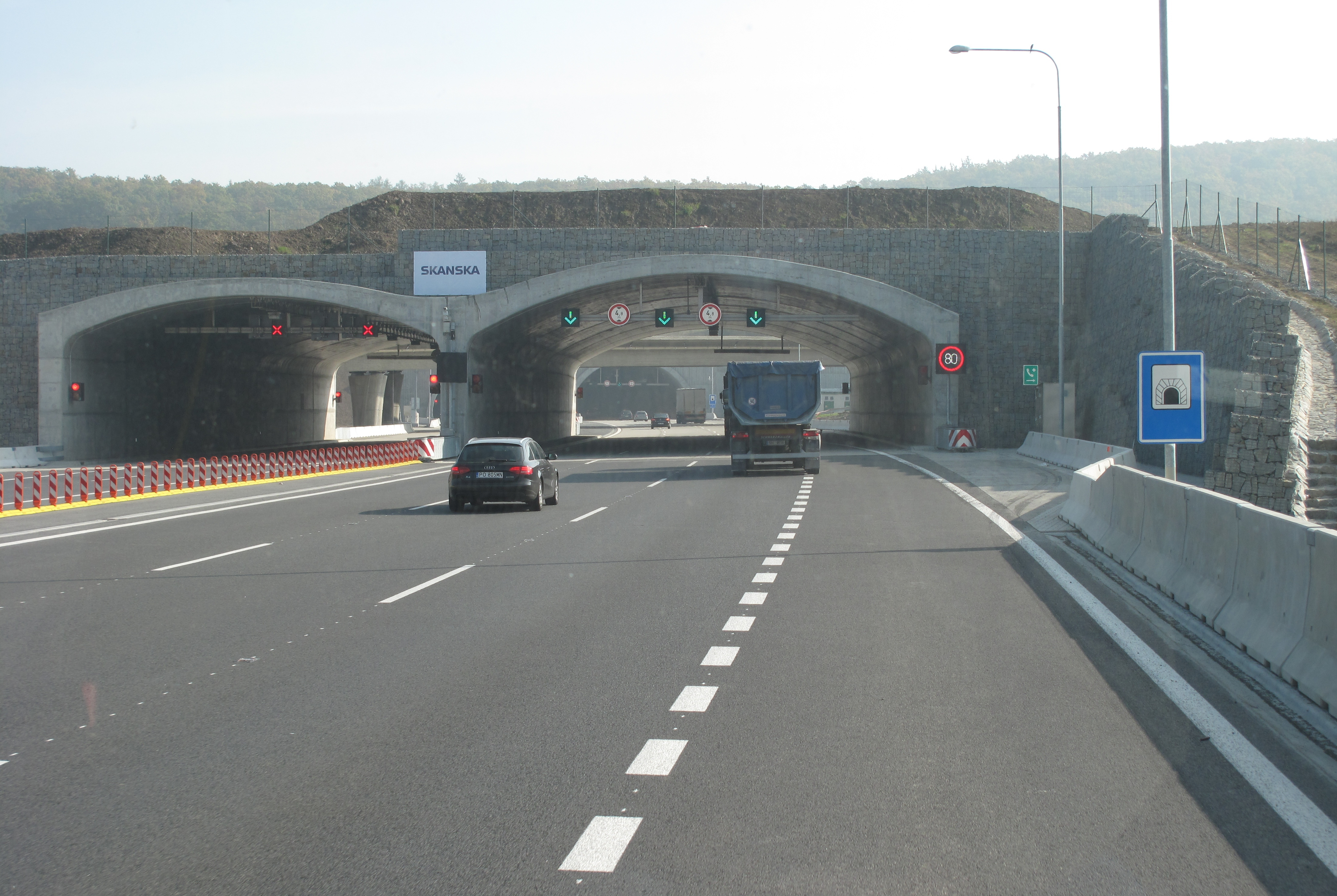 Pražský okruh - jižní část.